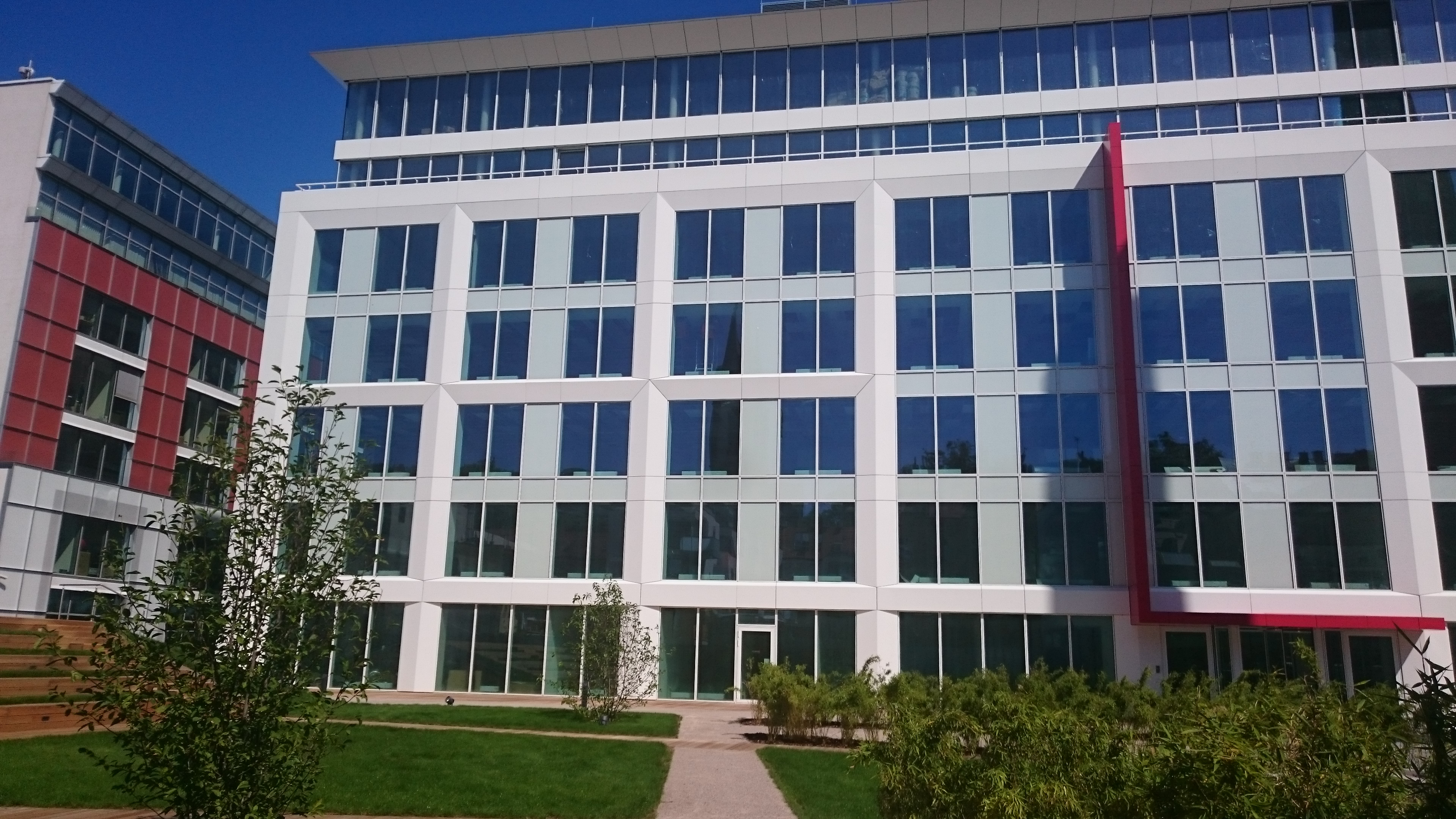 Nová část Corso Court od Ricarda Bofilla v pražském Karlíně. Praha, Česká republika.